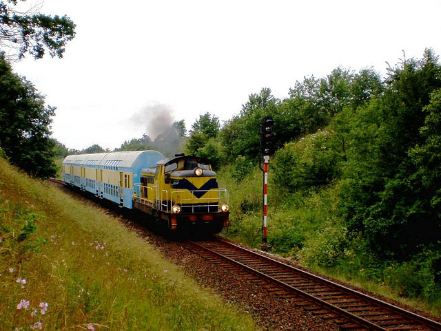 Złe warunki oświetleniowe d